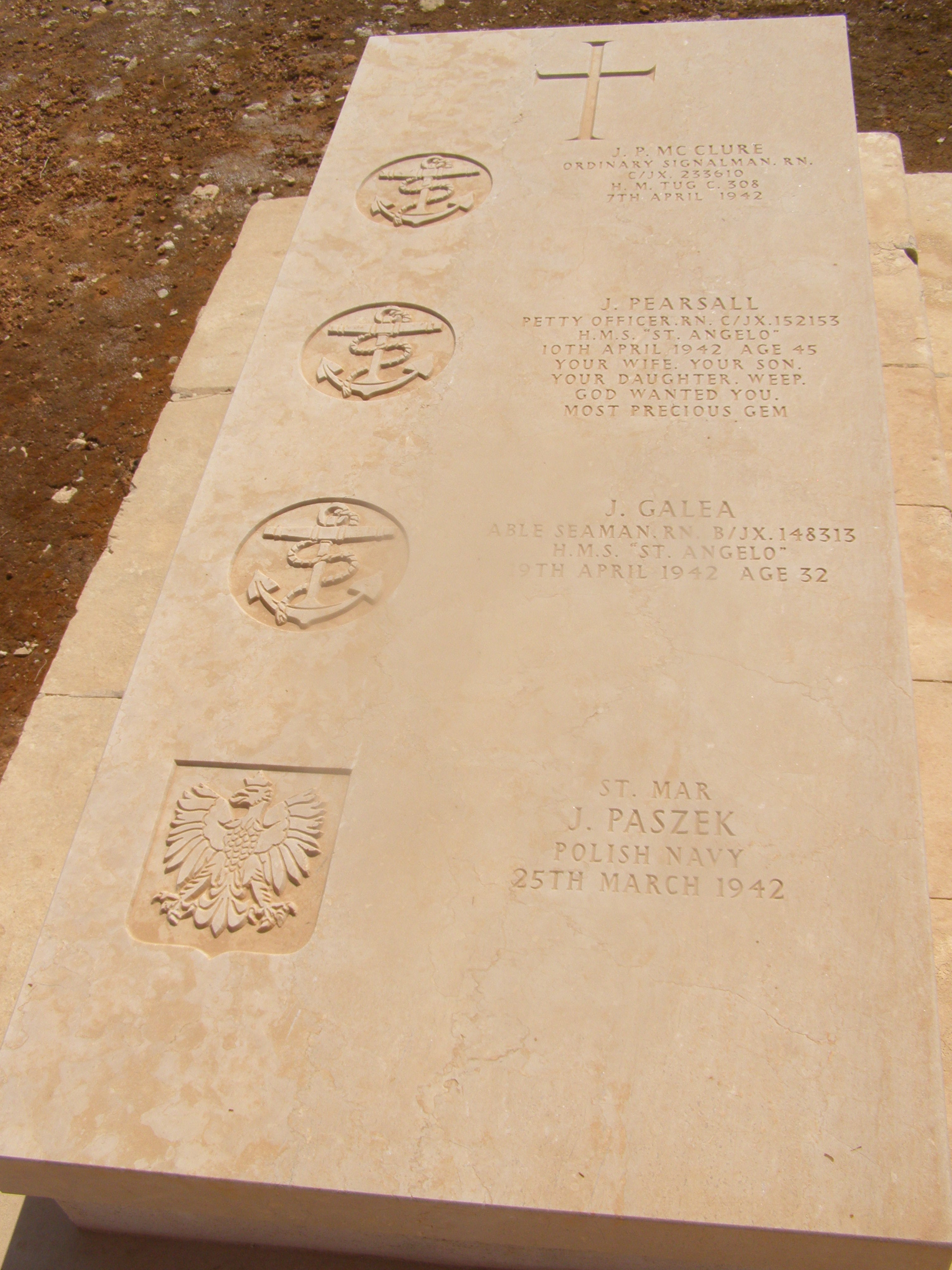 Zbiorowy grobowiec w którym pochowany jest st.mar. Józef Paszek. Kwaterze P Malta Naval Cemetery w mieście Kalkara.